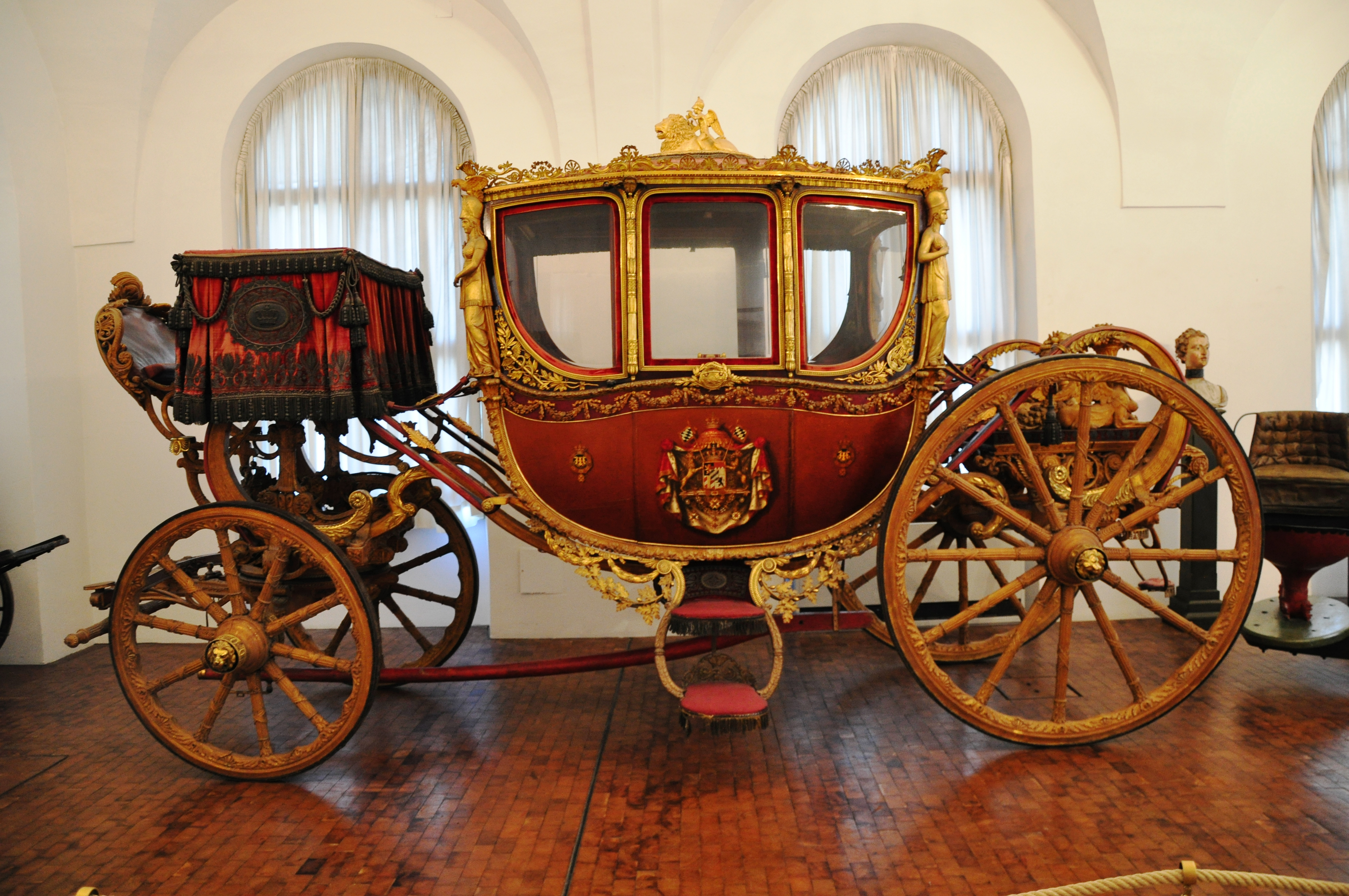 Kutschenmuseum Nymphenburg, zweiter Krönungswagen von König Max I. Joseph, Entwurf: Johann Christian Ginzrot, Fabrikant: Georg Lankensberger, München 1818